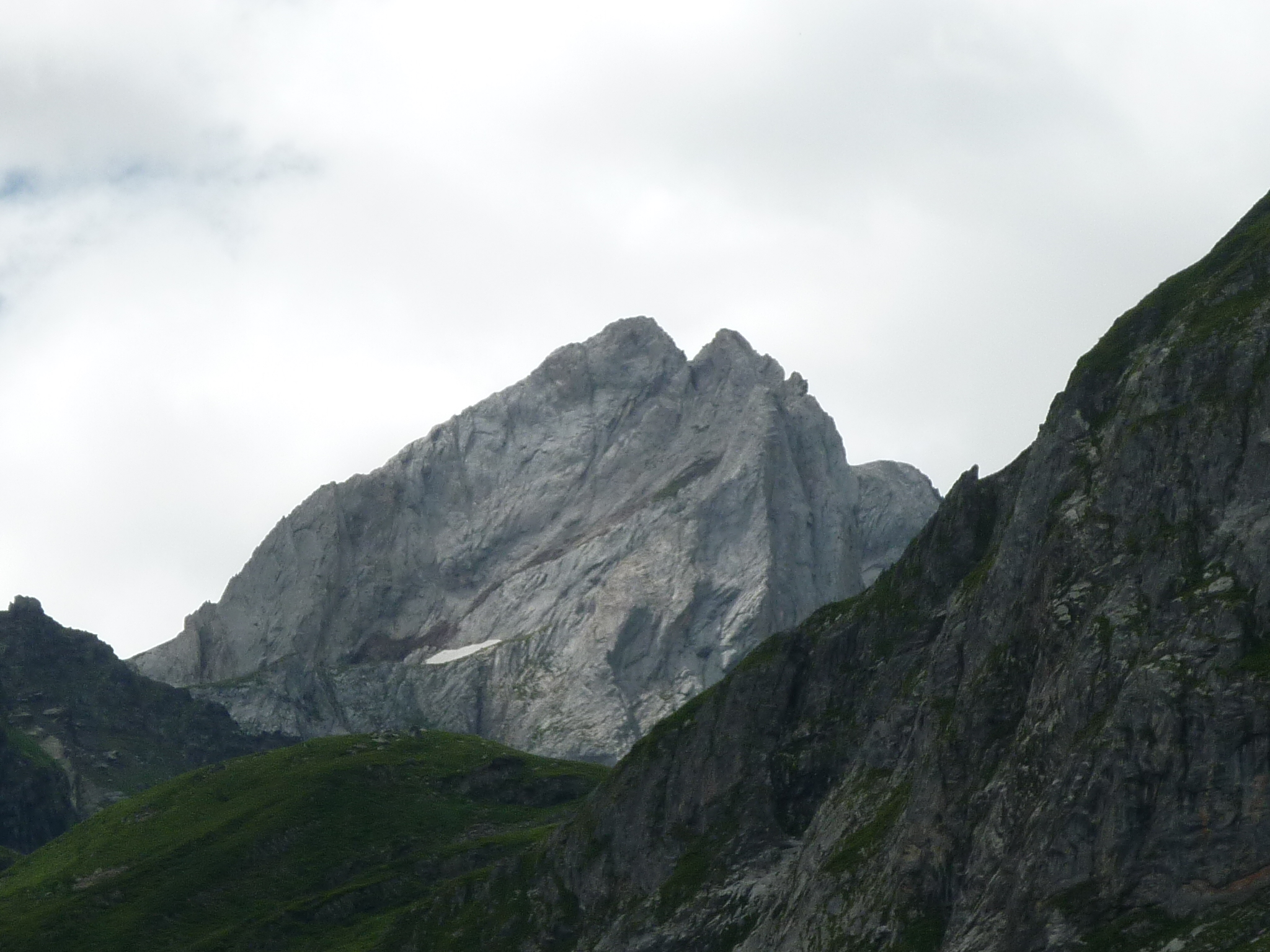 La Forcanada des de l'Artiga de Lin (Vall d'Aran) This is a a photo of a natural area in Catalonia, Spain, with id: ES510088